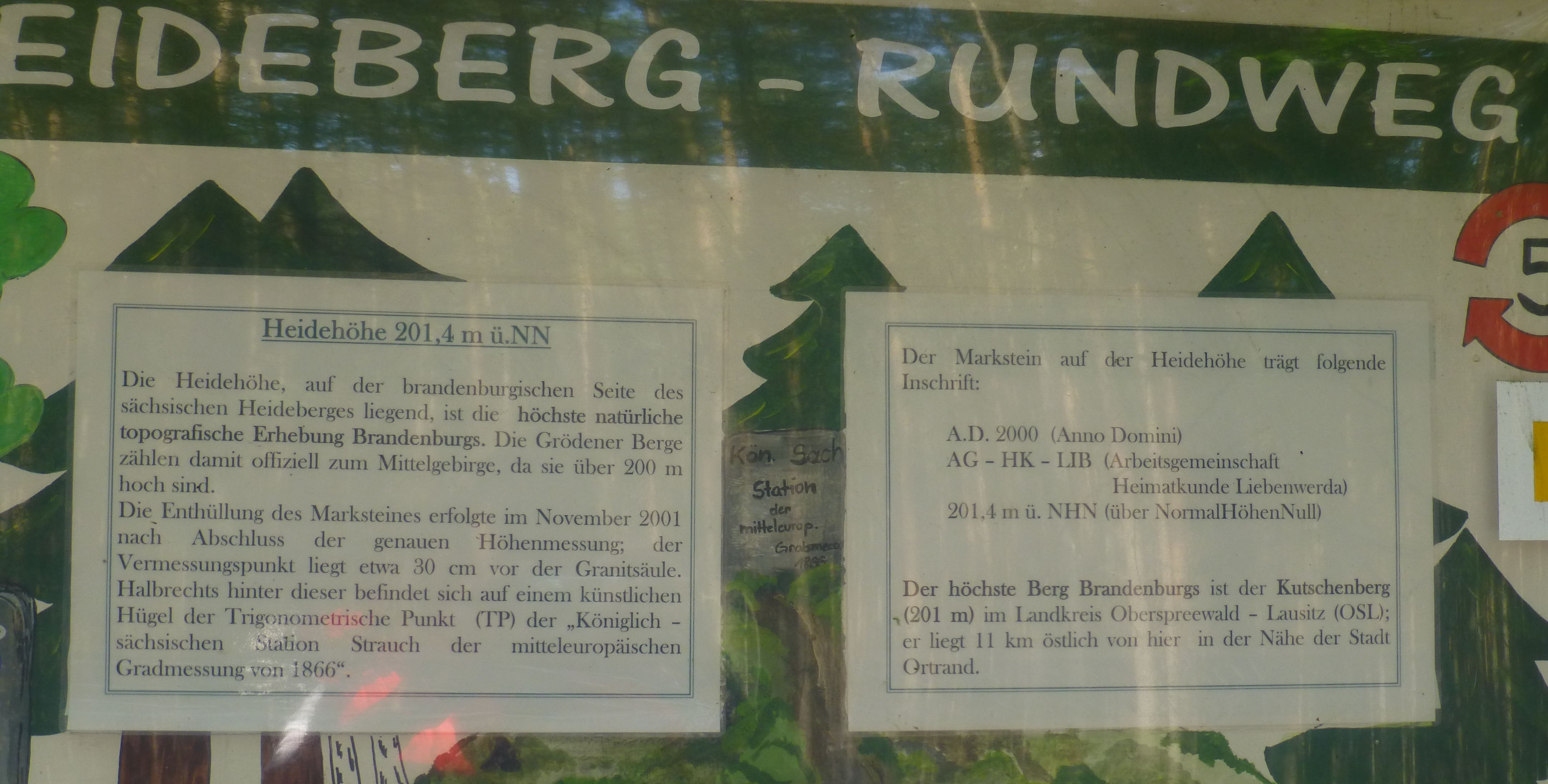 Hinweisschild neben der Heidehöhe am Heideberg Rundweg